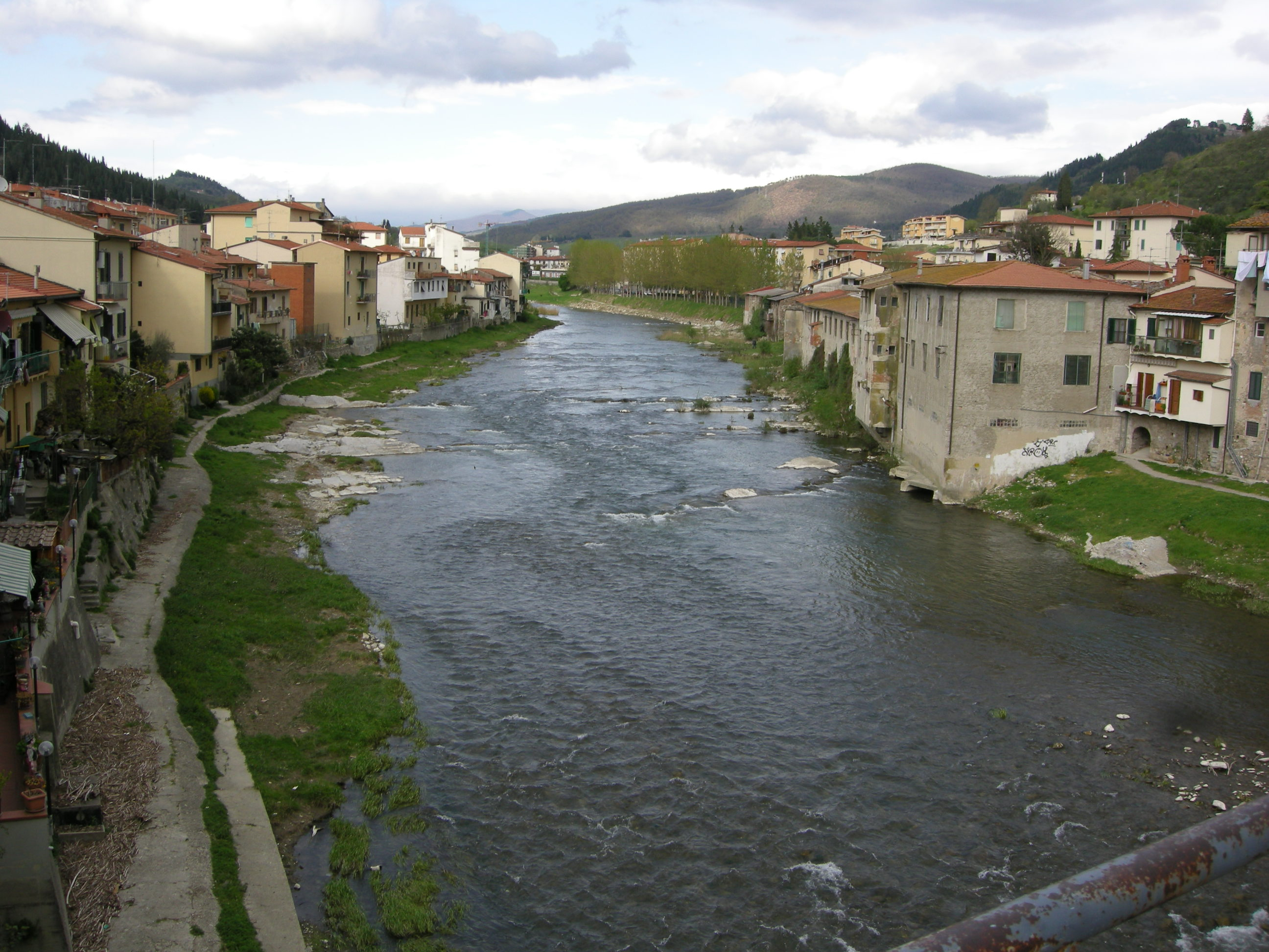 Pontassieve, sieve